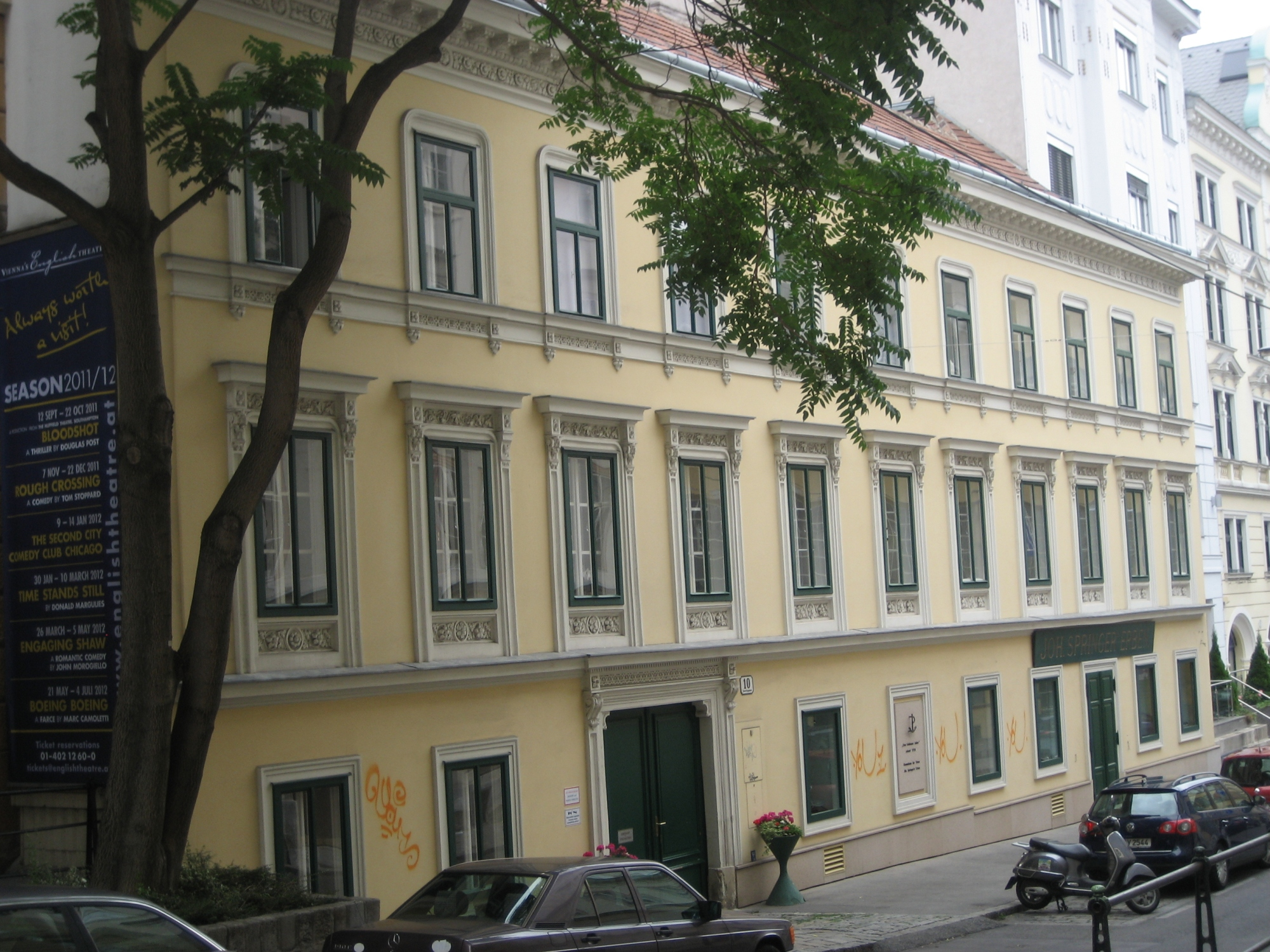 das Haus Josefsgasse 10 in der Josefstadt, in Wien